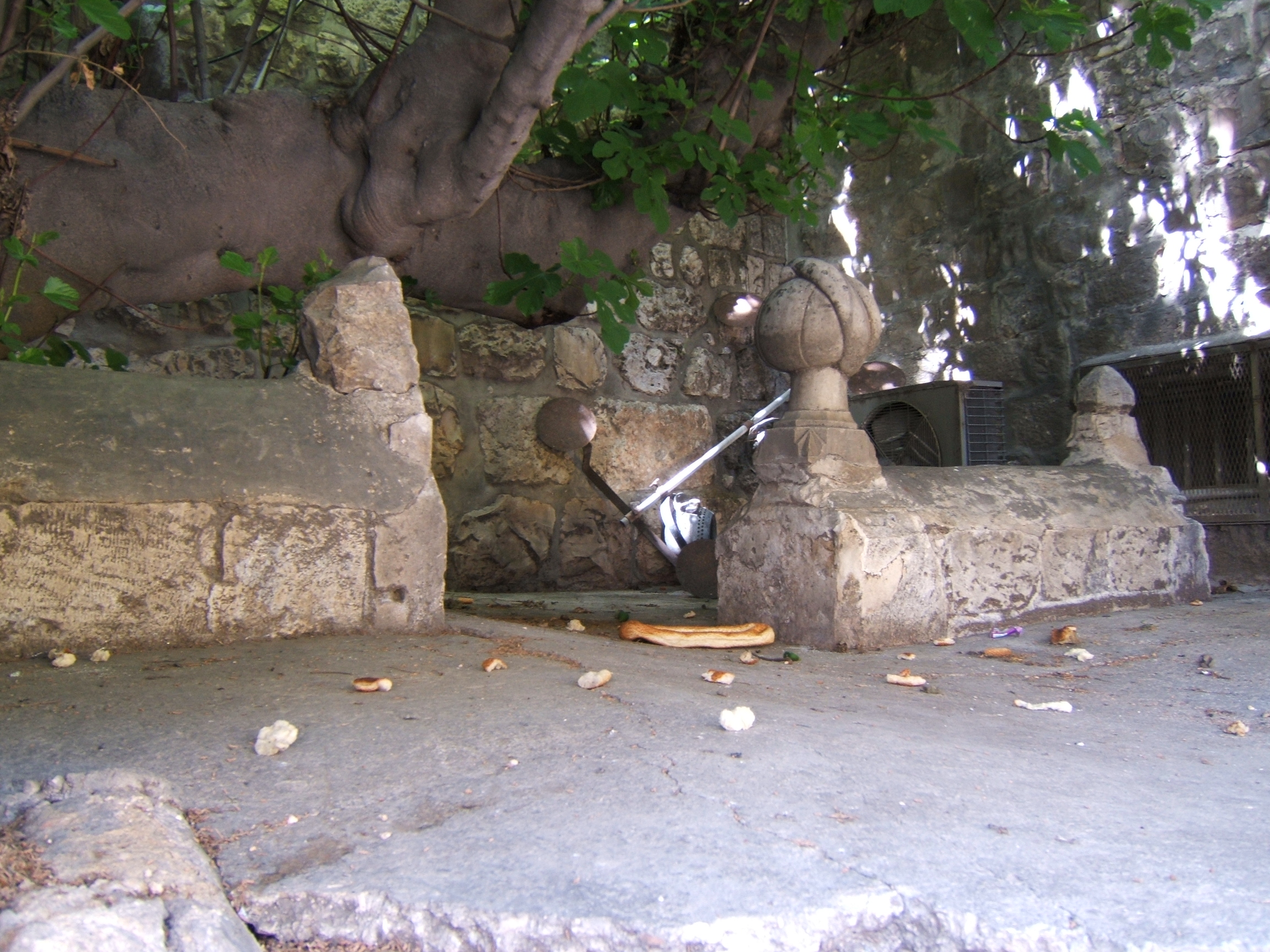 Tumbas de los arquitectos que proyectaron y construyeron las murallas de la ciudad vieja de Jerusalén, ejecutados por orden del Sultán Suleimán el Magnífico luego de concluidos los trabajos, para impedir que puedan constuir otra obra semejante que eclipse a ésta (Según otra versión, para impedir que puedan revelar las debilidades de la muralla a los enemigos; y según una tercera, le resultó más económico al Sultán pagar a un verdugo por 5 minutos de trabajo, que a dos arquitectos por 4 años ...). Y existe aun una cuarta: el Sultán enfureció al comprobar que el trazado de la muralla, dejó fuera de su perímetro al Monte Sión y a la tumba del rey David. Puerta de Jafa, Jerusalén, Israel.